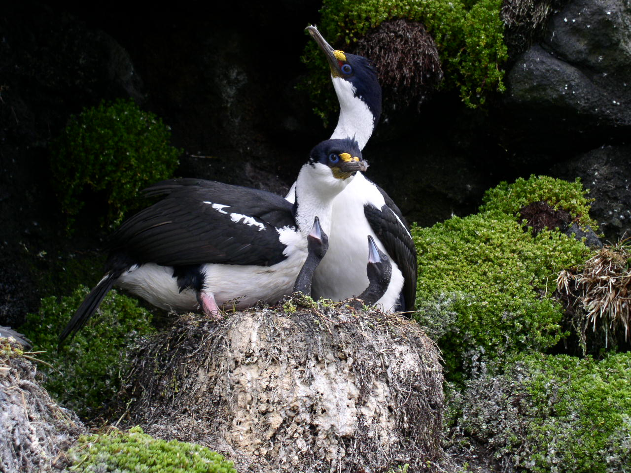 Couple de cormorans de Crozet sur nid avec leurs poussins, à la pointe du Bougainville (île de la Possession).